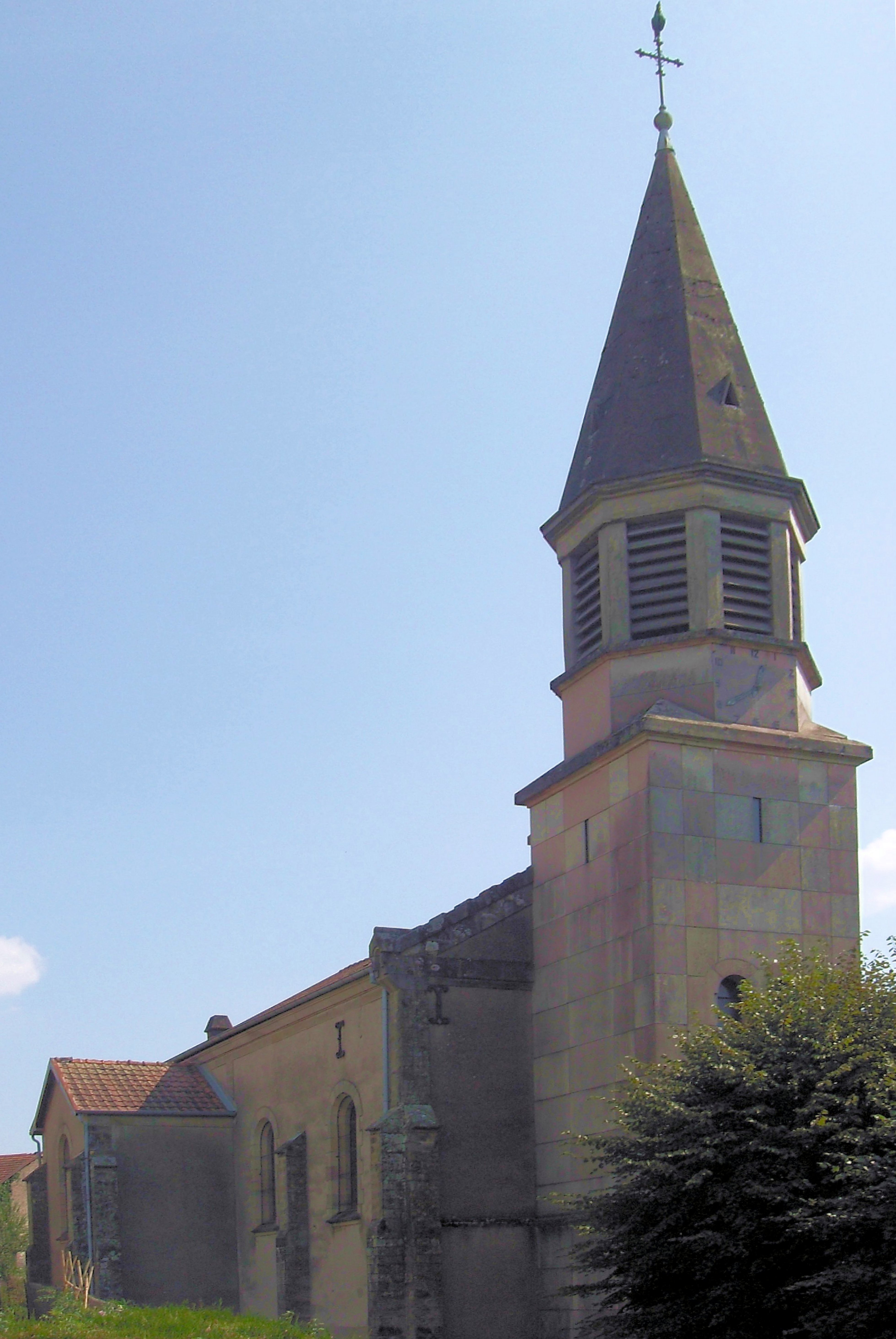 L'église Saint-Martin à Chagey